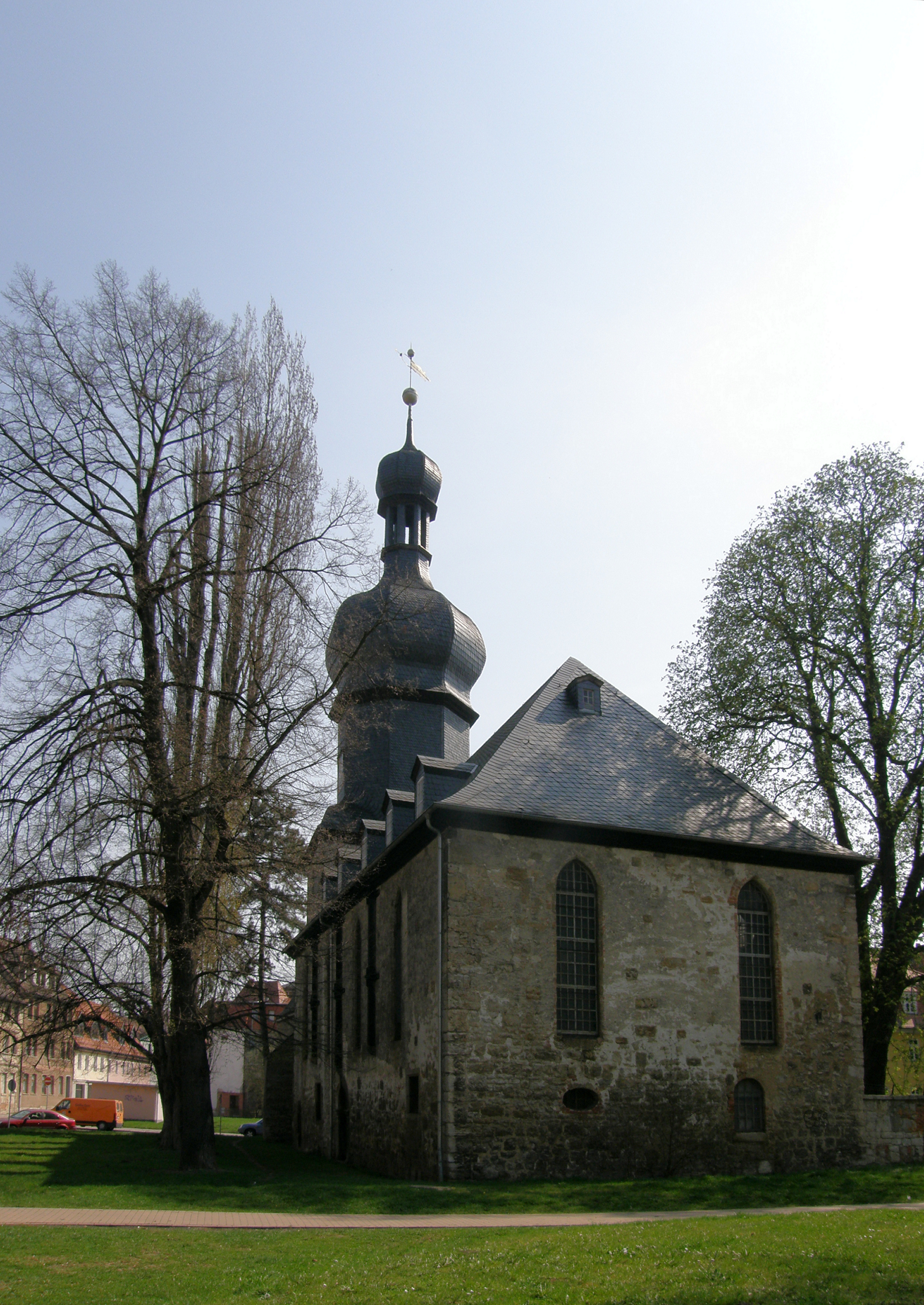 Stadt Apolda - Martinskirche